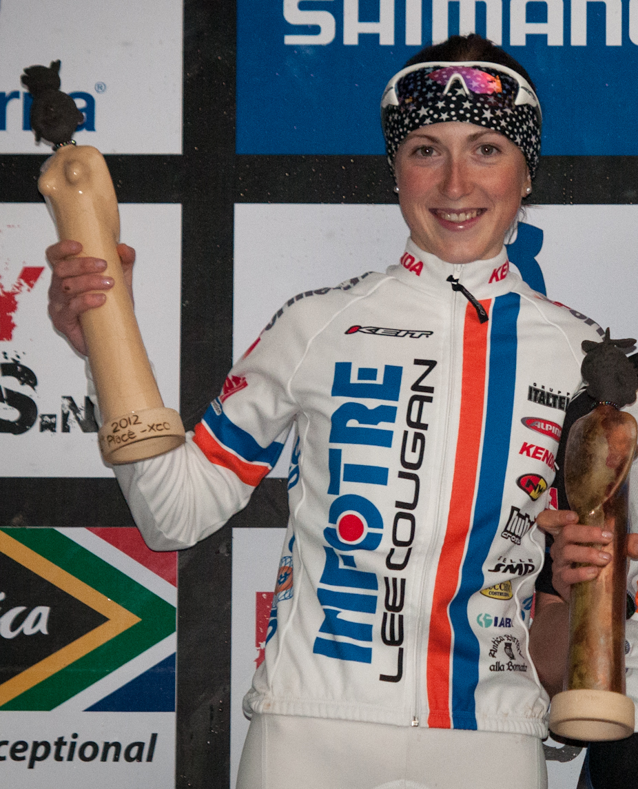 Yana Belomoina, Ukrainian cyclist